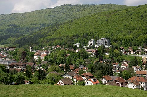 Moutier